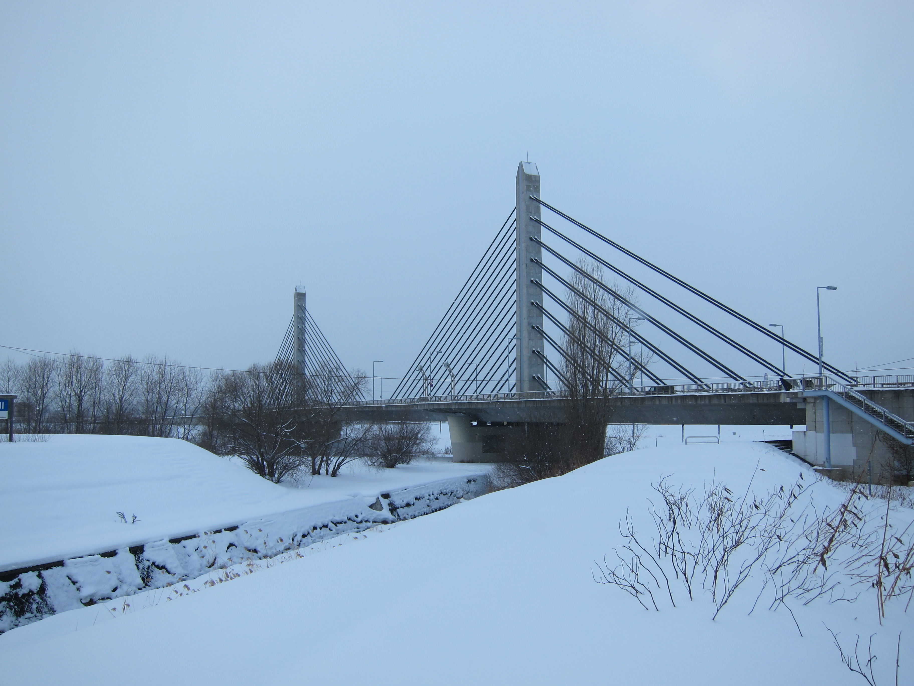 ツインハープ橋(北海道旭川市)